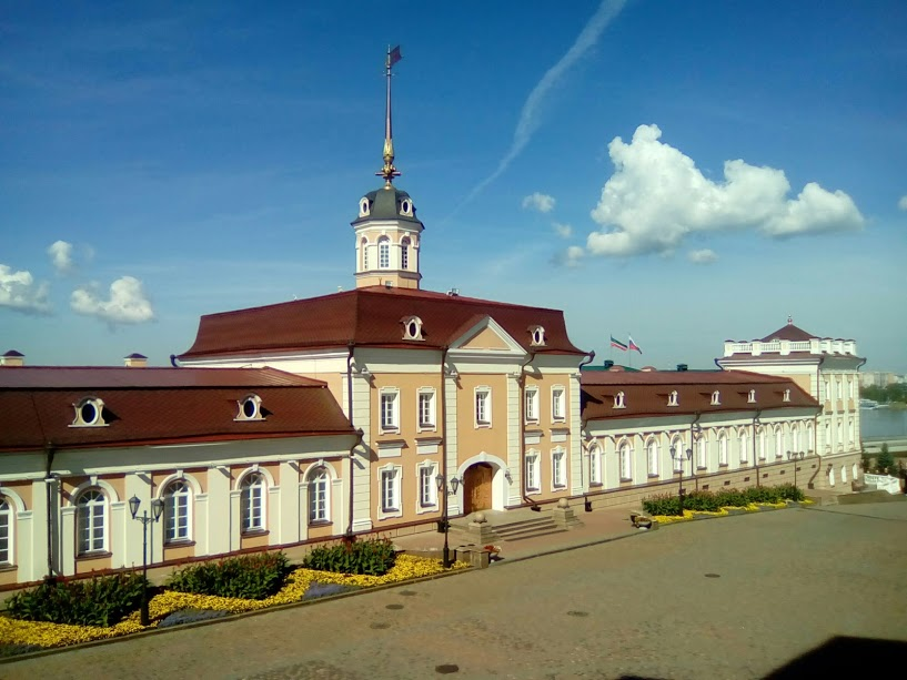 Артиллерийский (пушечный) двор: Кремль, Казань, Татарстан